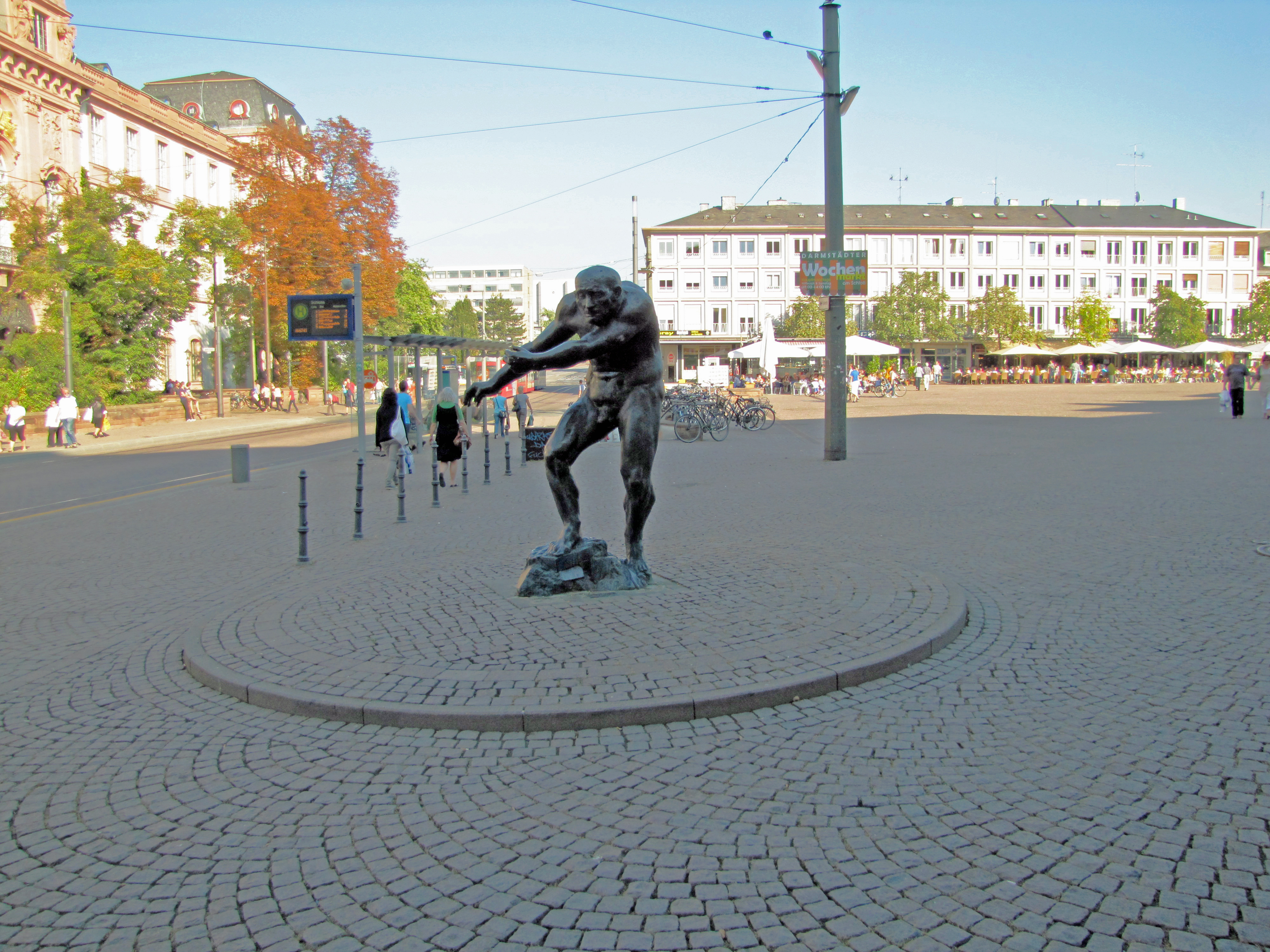 Der Berserker, 1976-79, von Waldemar Grzimek, auf dem Marktplatz in Darmstadt.